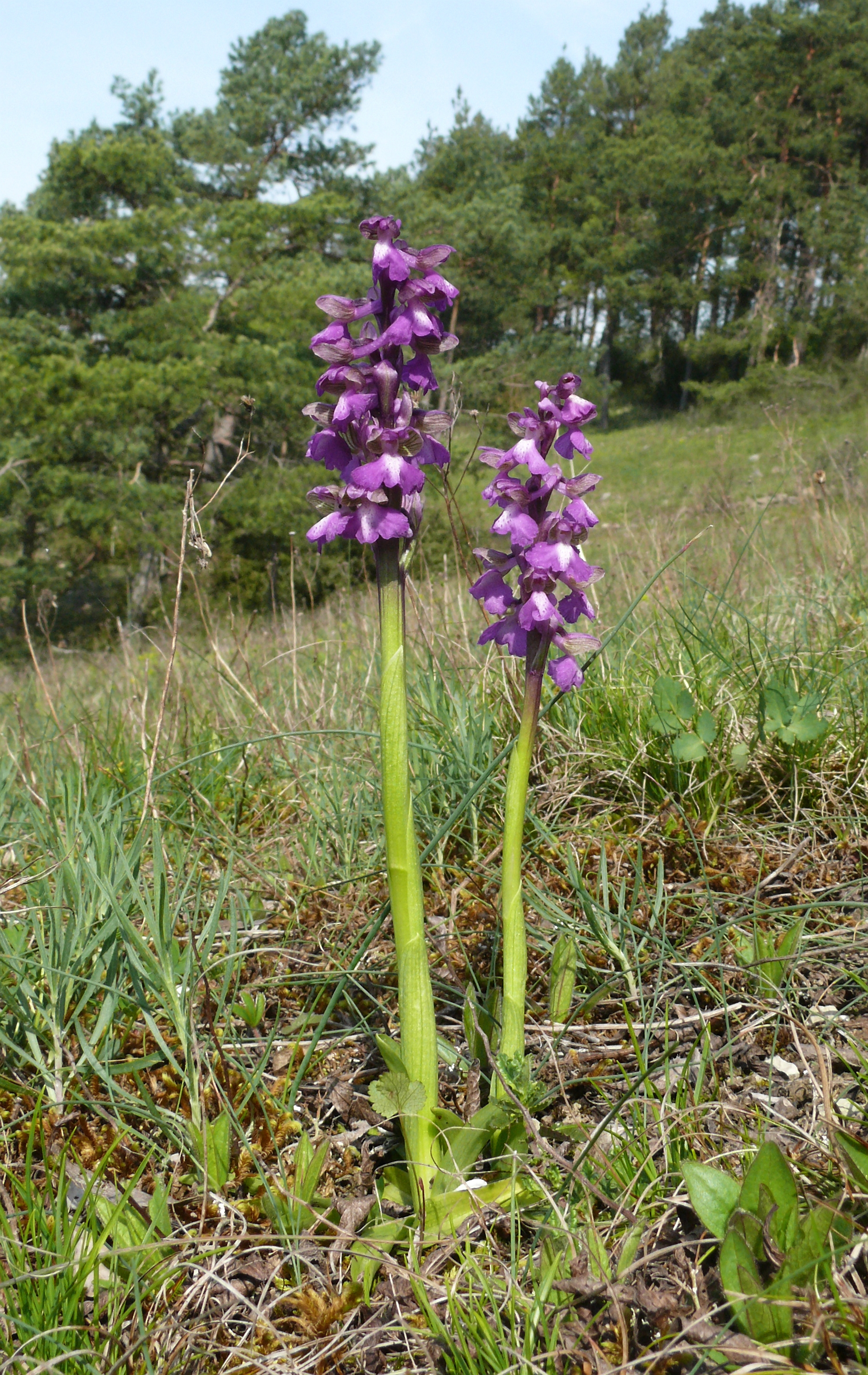 Orchis morio, auf tauberfränkischem Trockenrasen (Carex humilis-Aster linosyris-Gesellschaft) Tauberland, Deutschland